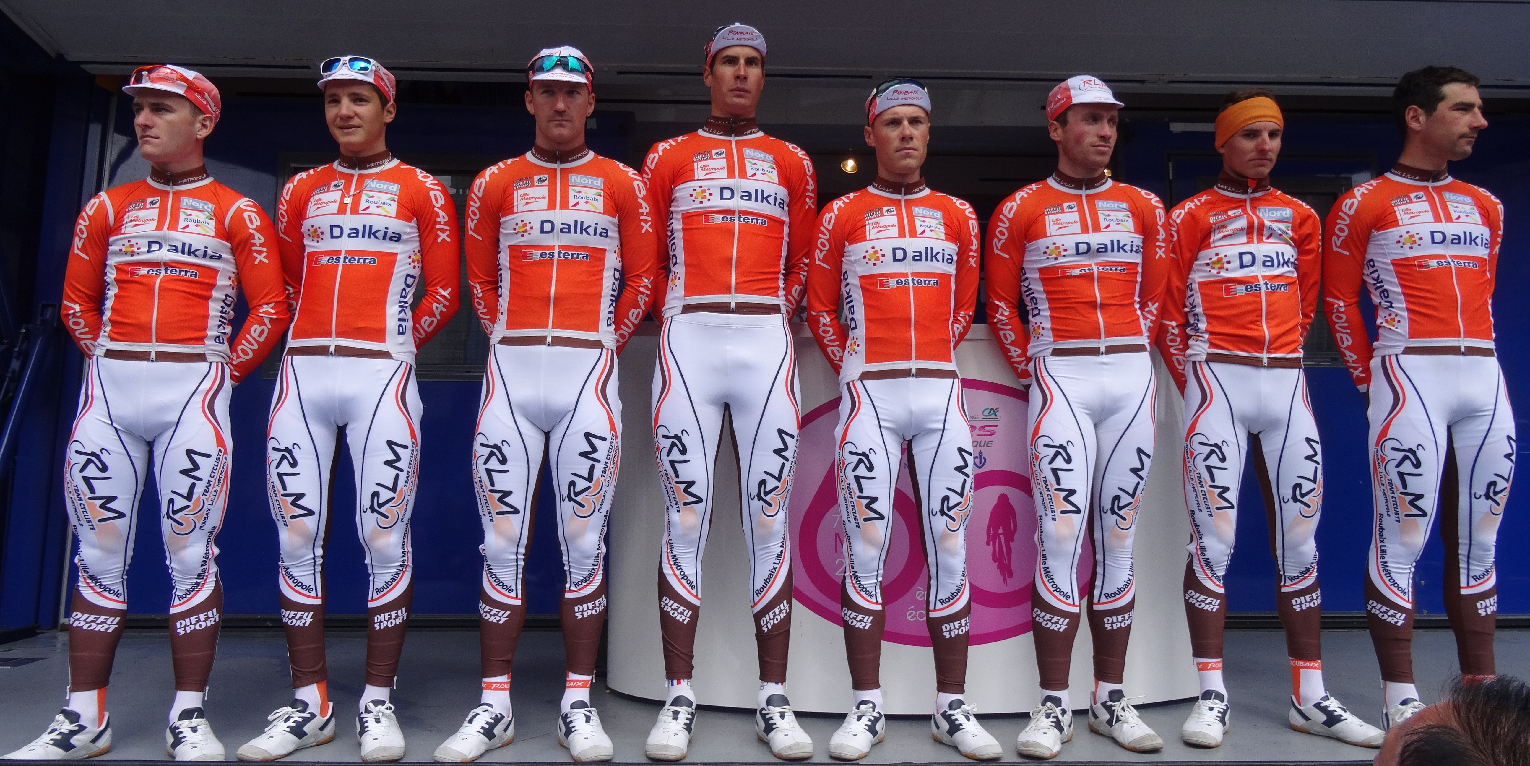 Reportage photographique réalisé le mercredi 7 mai 2014 au départ de la première étape de l'édition 2014 des Quatre jours de Dunkerque à Dunkerque, Nord, Nord-Pas-de-Calais, France. Depicted people: Rudy Kowalski, Jimmy Turgis, Timothy Dupont, Jean-Lou Paiani, Maxime Vantomme, Romain Pillon, Quentin Jauregui and Julien Duval Depicted team: Roubaix Lille Métropole